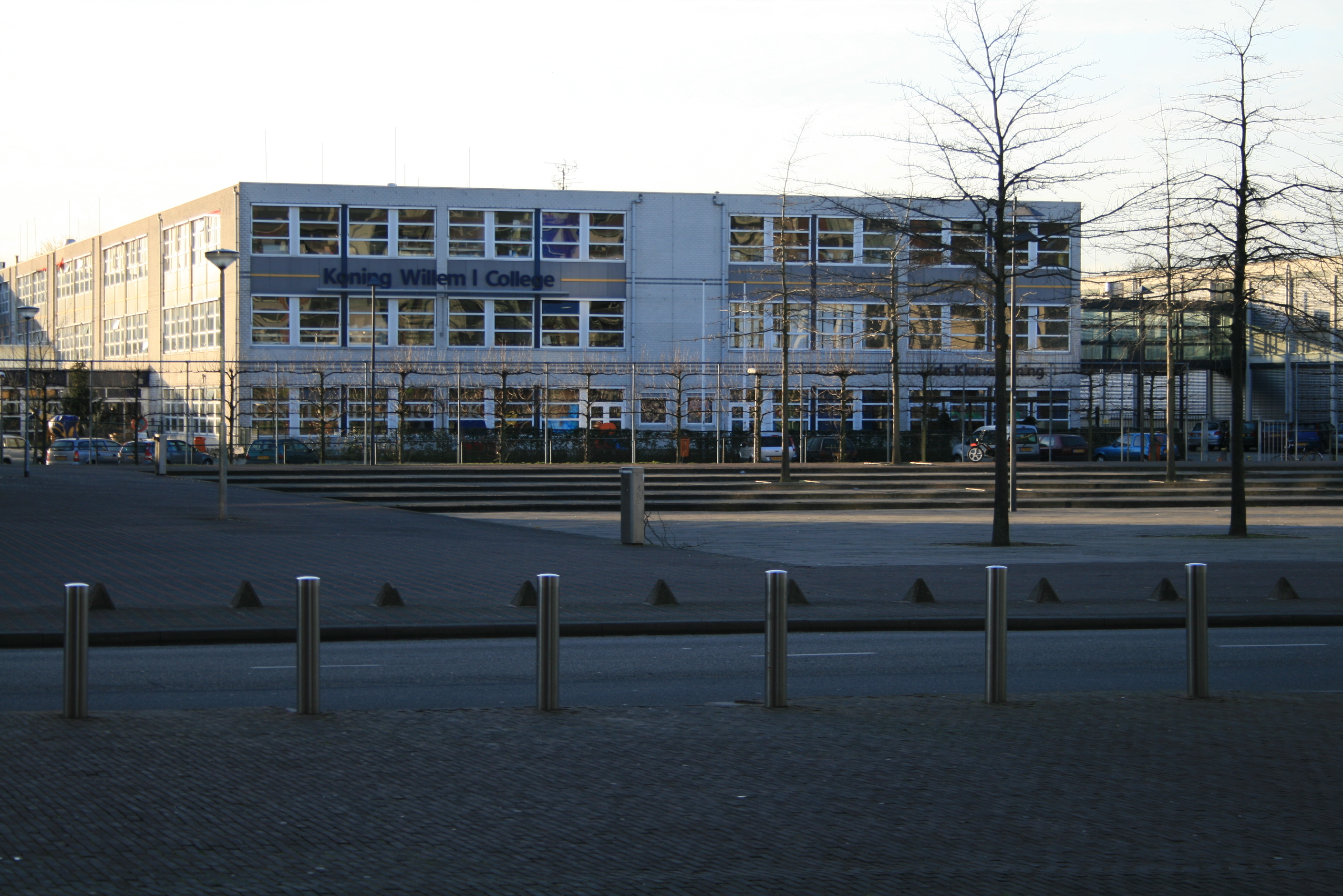 Koning Willem I College, locatie Onderwijsboulevard in Den Bosch